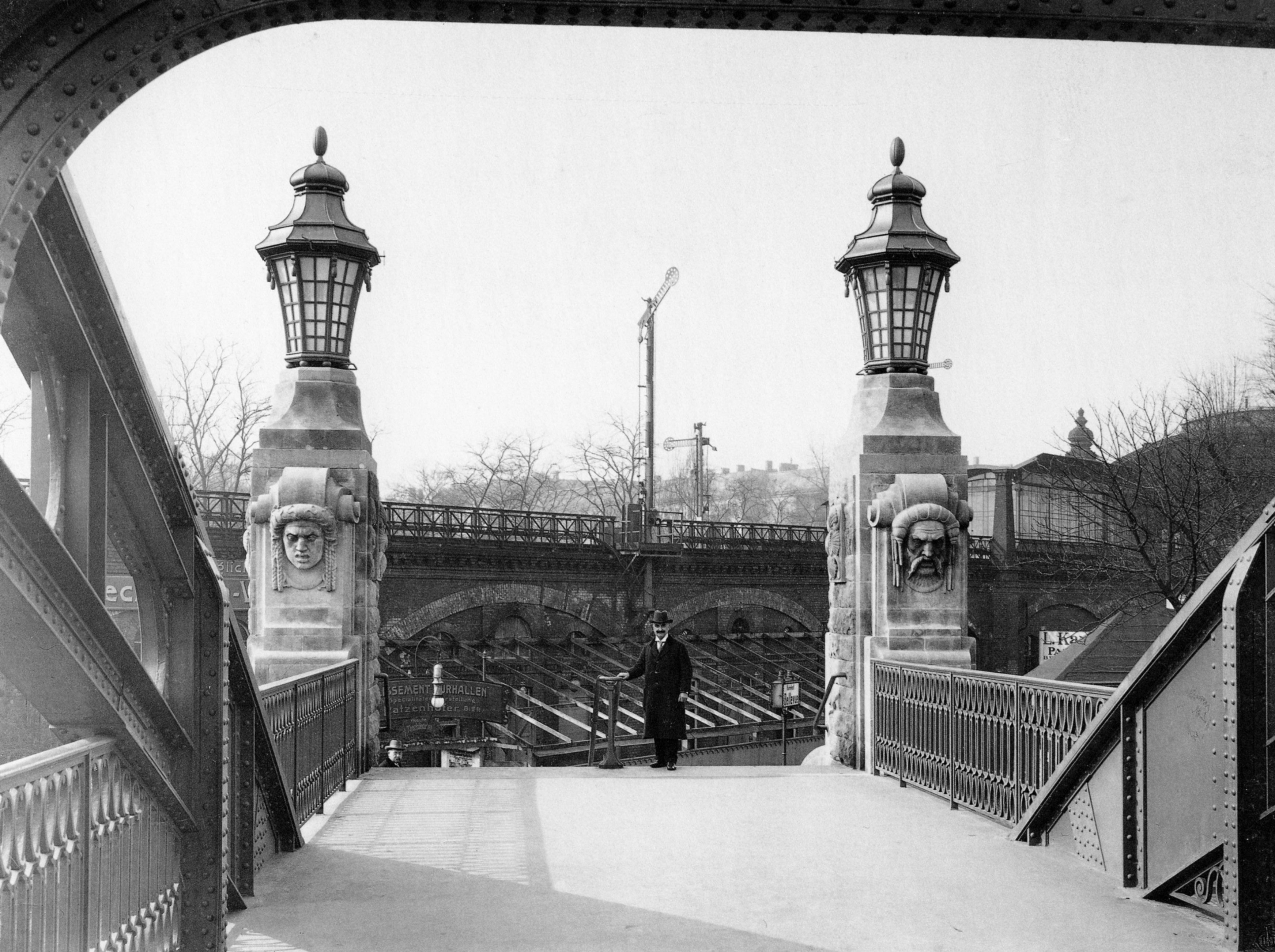 Gerickesteg über die Spree in Berlin